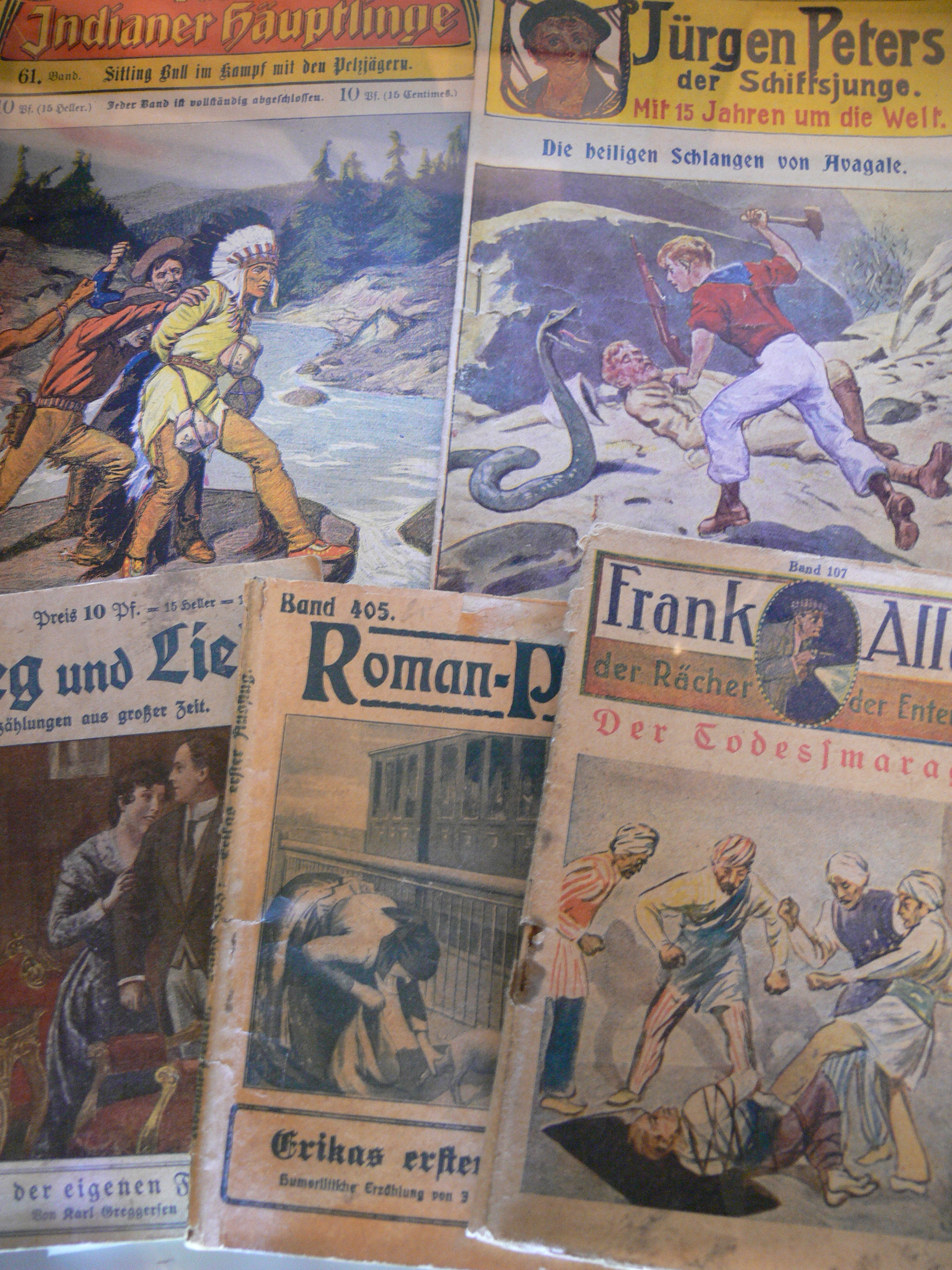 deutsche Groschenromane des frühen 20. Jahrhunderts